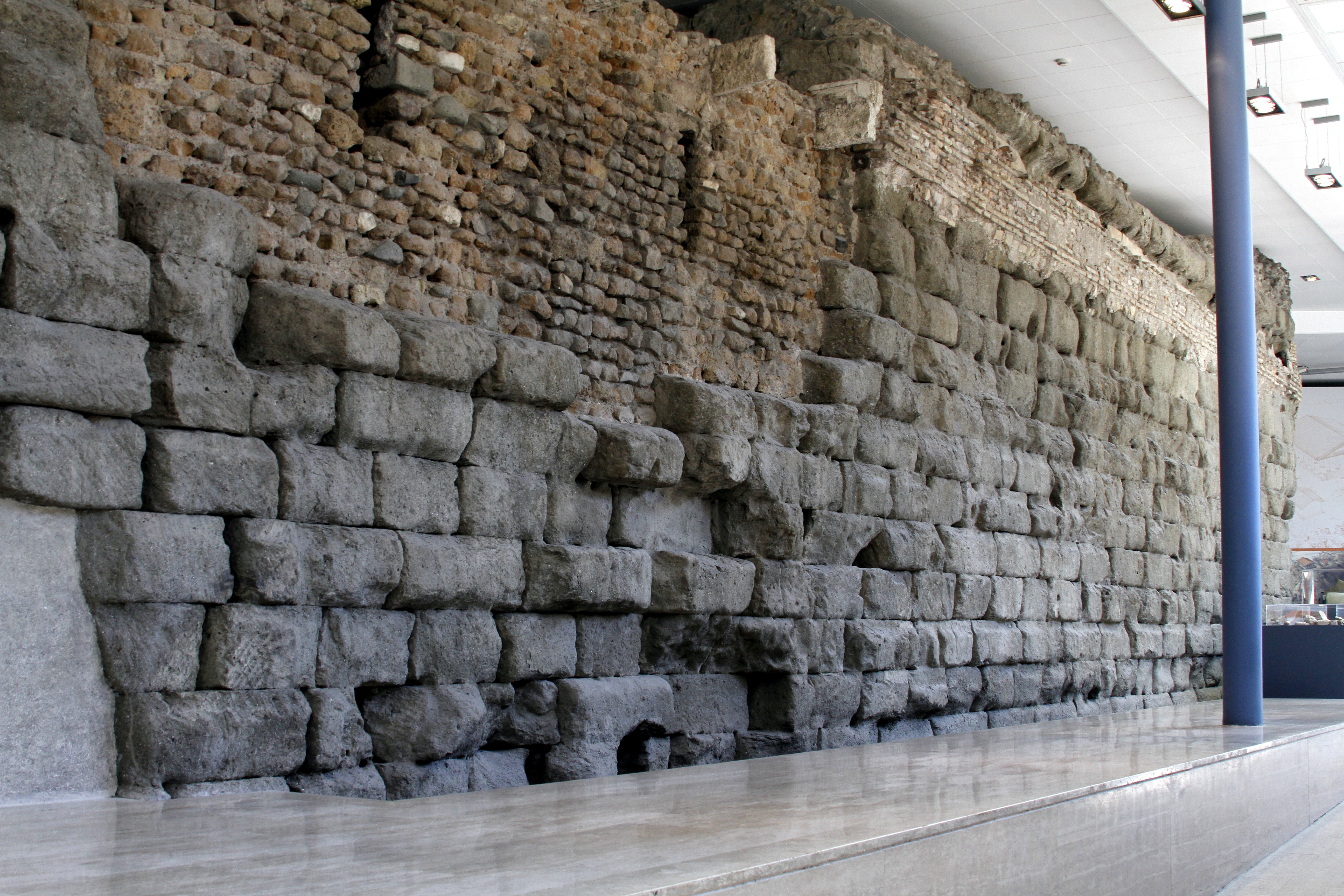 Temple of Jupiter Optimus - Palazzo dei Conservatori - Rome